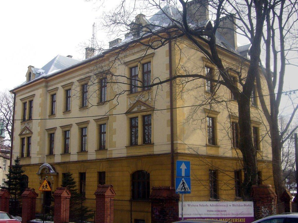 Budynek Ewangelickiego Domu Opieki "Soar" w lutym 2010.